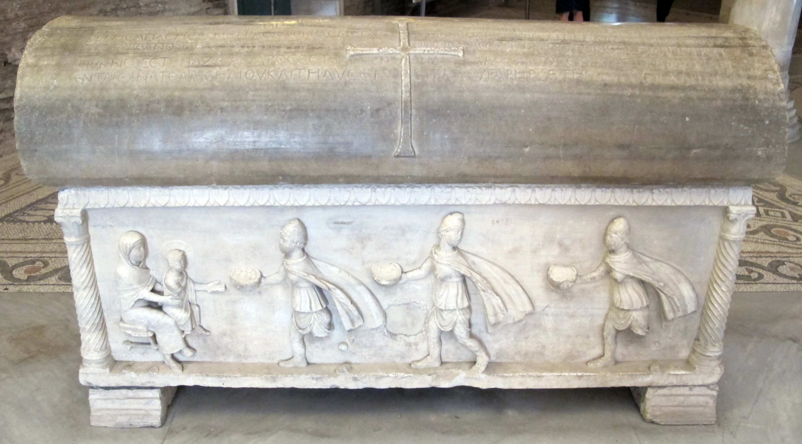 Basilica di San Vitale - MIBAC This is a photo of a monument which is part of cultural heritage of Italy.